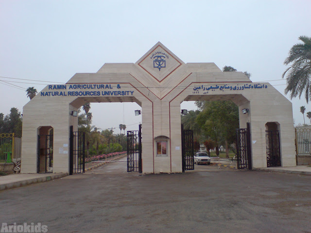 نمایی از سر در دانشگاه علوم کشاورزی و منابع طبیعی خوزستان